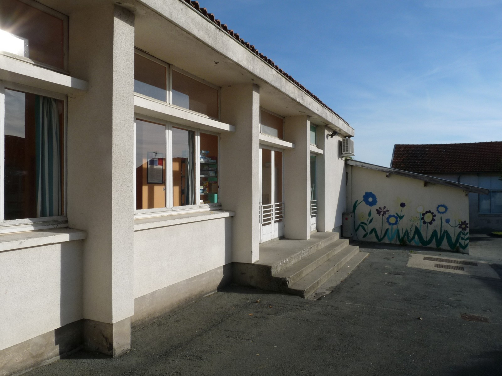 Ecole, St-Christophe-de-Double, Gironde, France